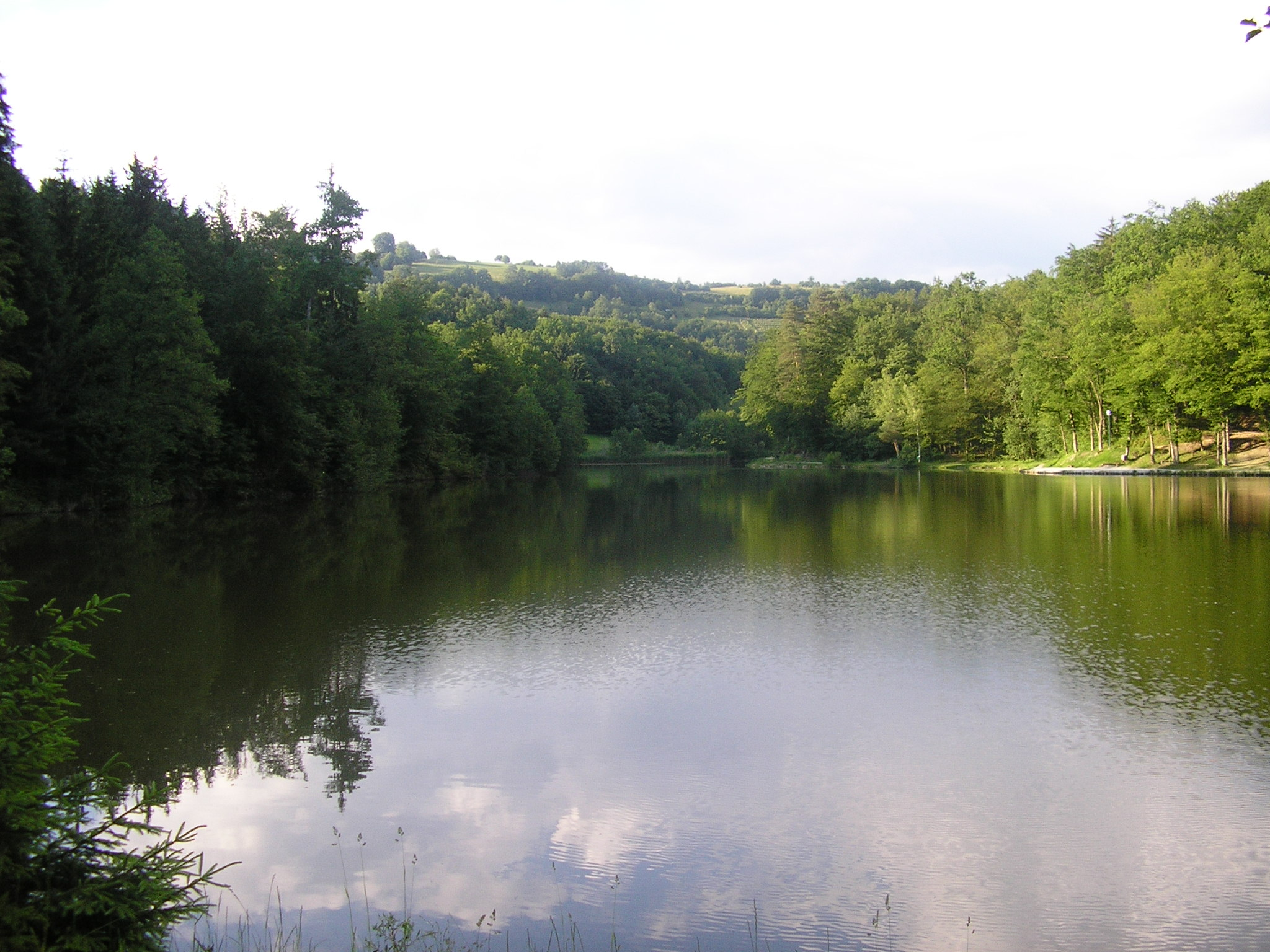 Ribniki Mačkovci, Brestanica